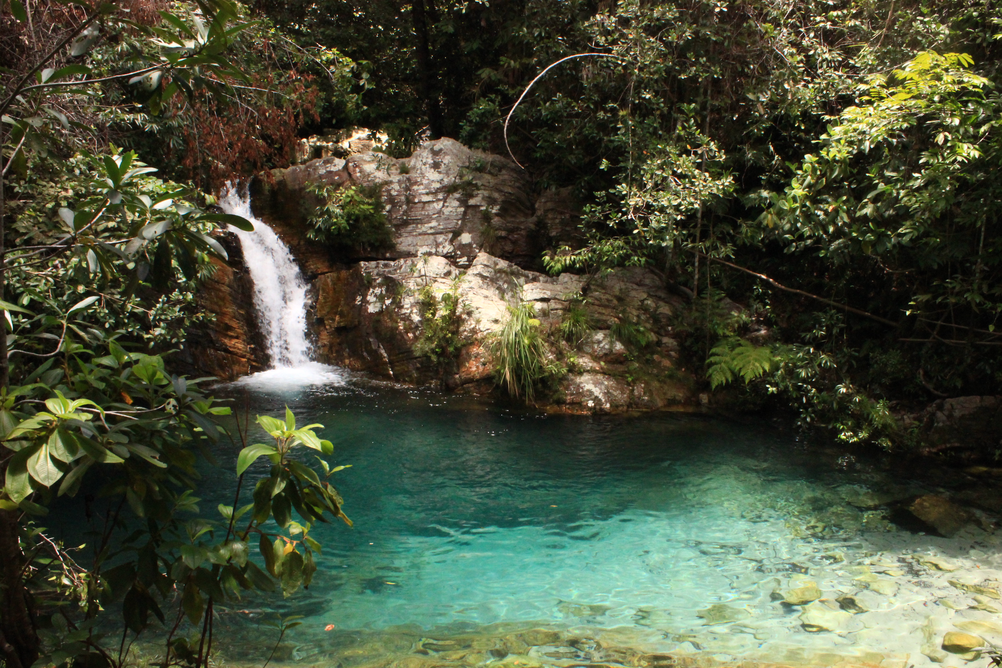 Cachoeira da Santa Barbarinha, GO